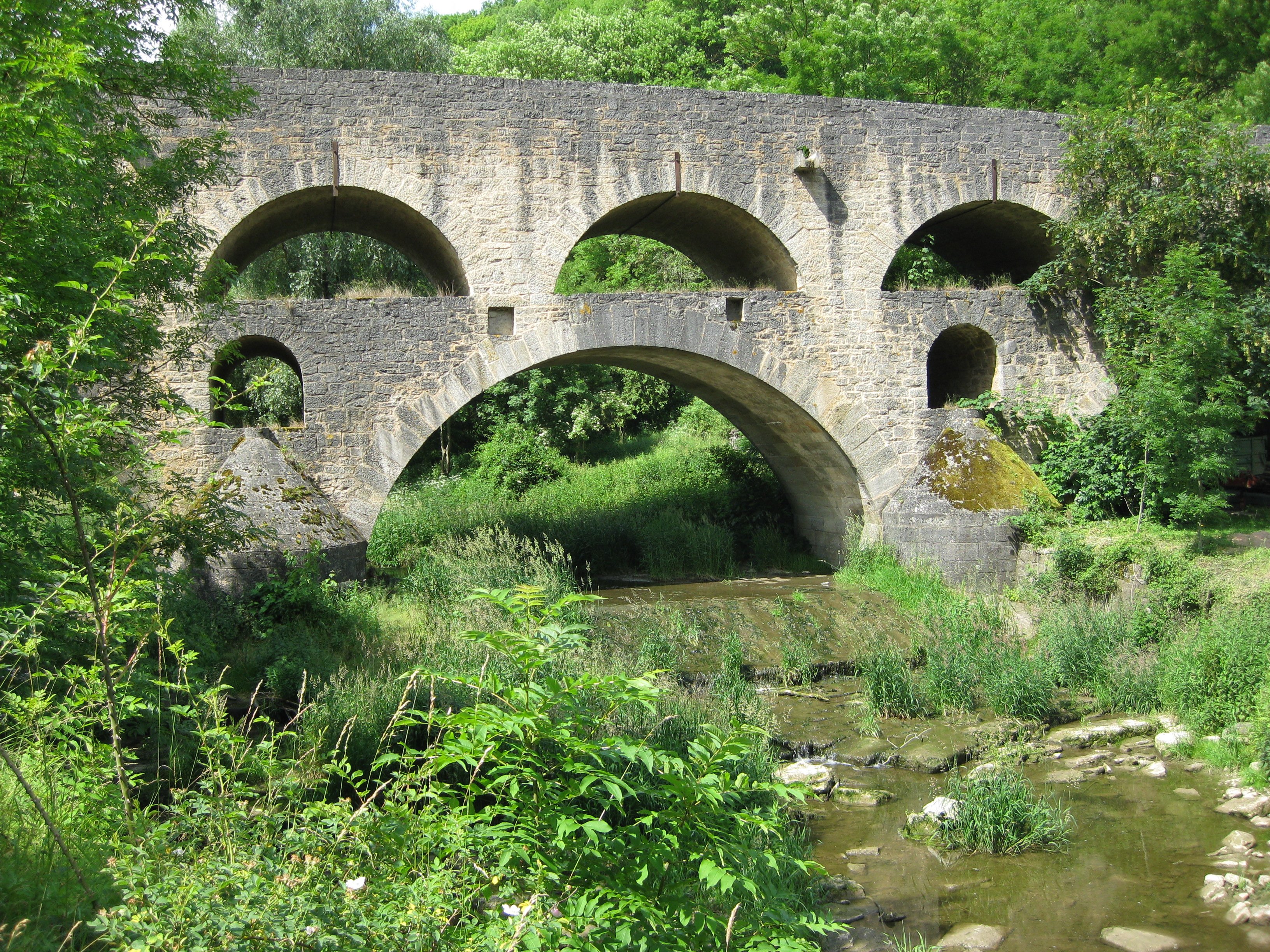 Tauberbruecke im Taubertal